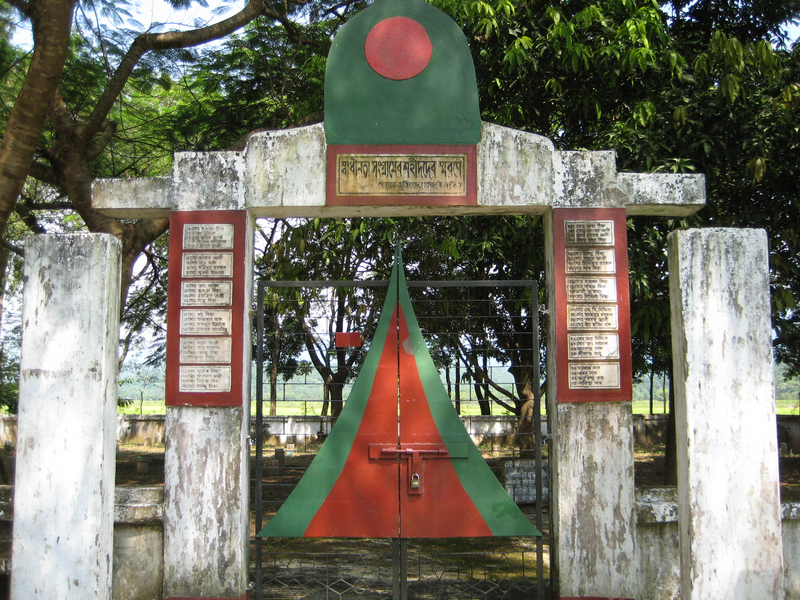 Dolura, Sunamgonj, Sylhet.